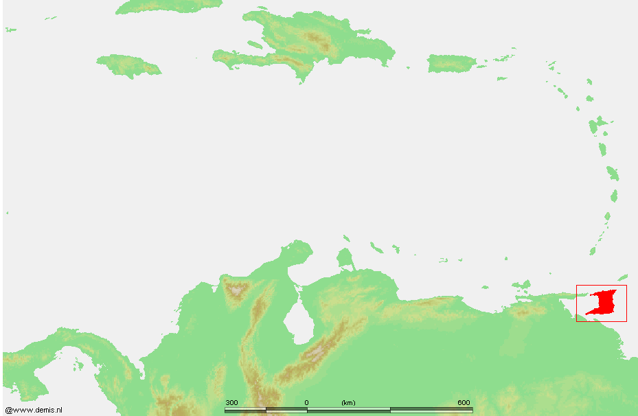 Caribbean - Trinidad.PNG